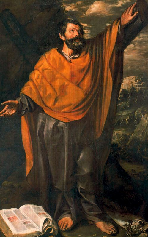 La obra representa al apóstol San Andrés, que fue hermano del apóstol San Pedro, el primer papa de la Iglesia Católica, y que al igual que él murió crucificado, según refiere la tradición.